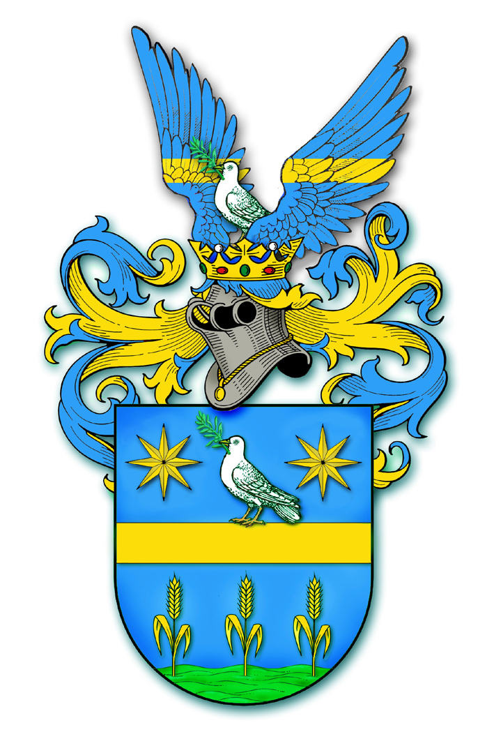 Brasão Sartori de Vicenza. A cimeira foi adotada pelo ramo brasileiro.